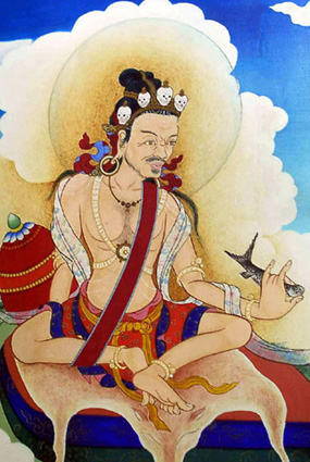 טילןפה, יוגי בודהיסטי הודי